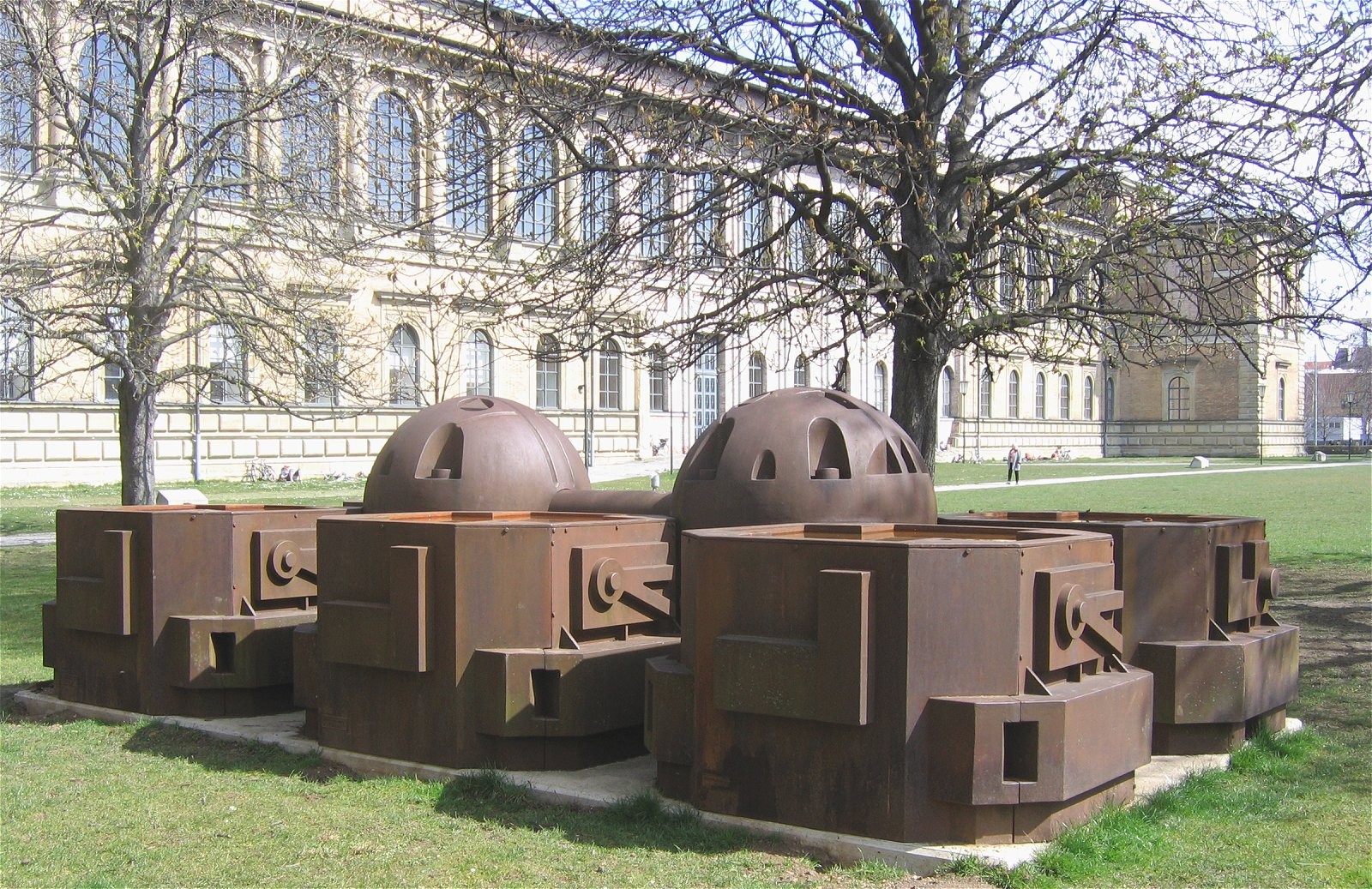 Eduardo Paolozzi: For Leonardo, 1986, Eisenguss; München, Skulpturenpark Pinakotheken, L 2344 (Leihgabe des Europäischen Patentamts)